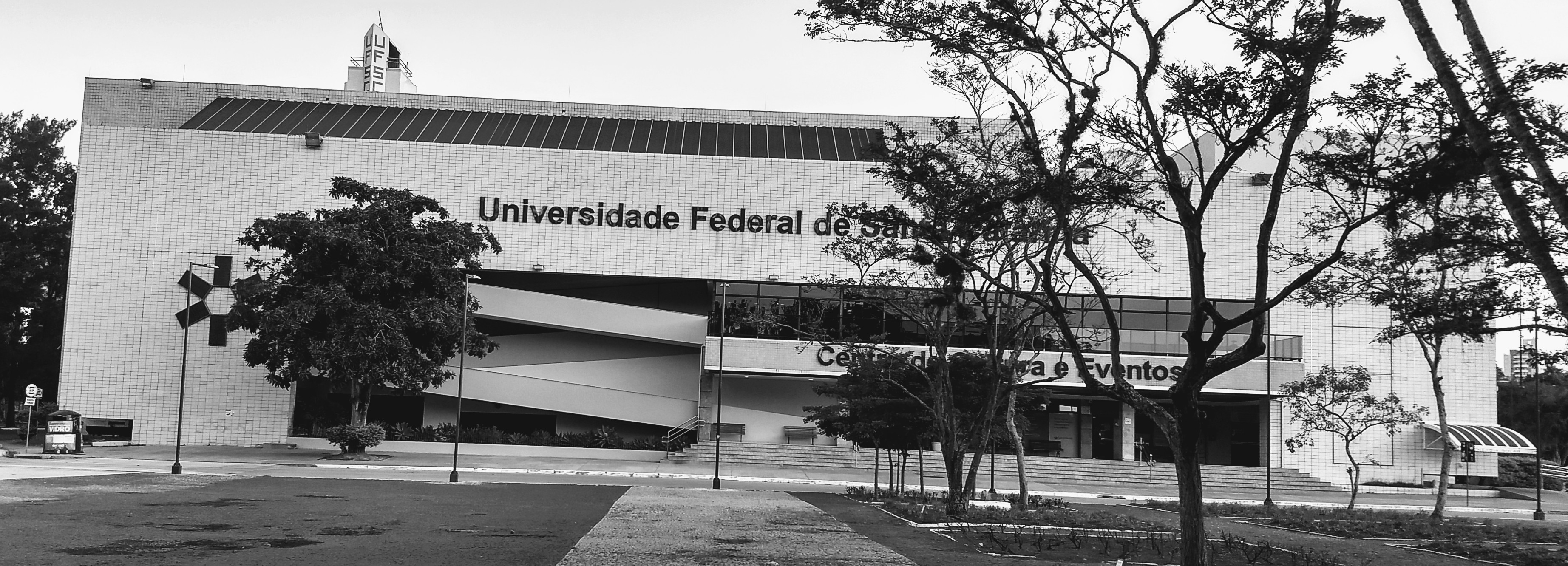 Foto tirada em frente a reitoria da UFSC em julho de 2019